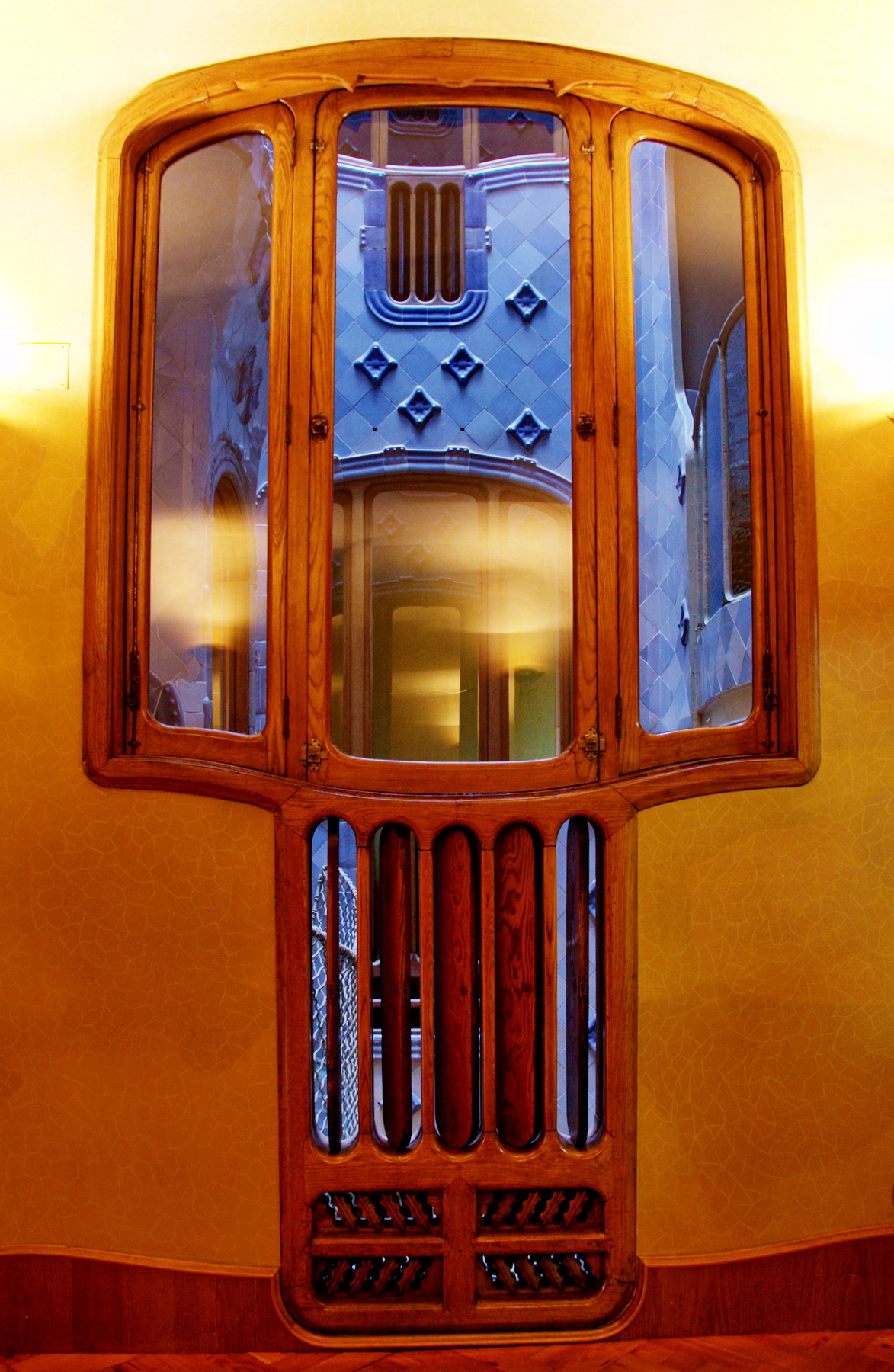 Finestra interior de la casa Batlló (1905-1907) amb el sistema de ventilació. És obra d'Antoni Gaudí.